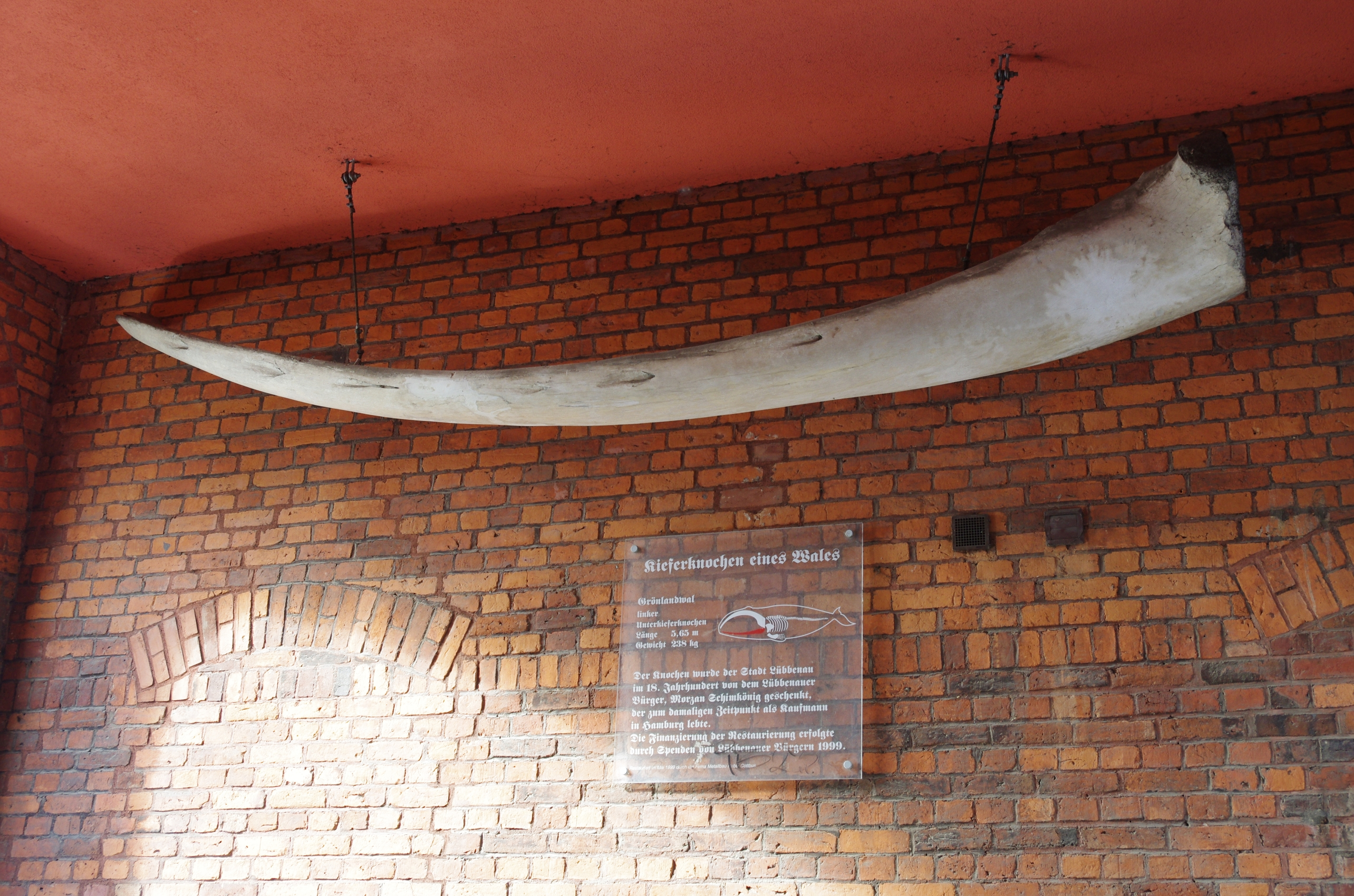 Lübbenau in Brandenburg. Der Kieferknochen eines Wales hängt in der Durchfahrt Topfmarkt 12.